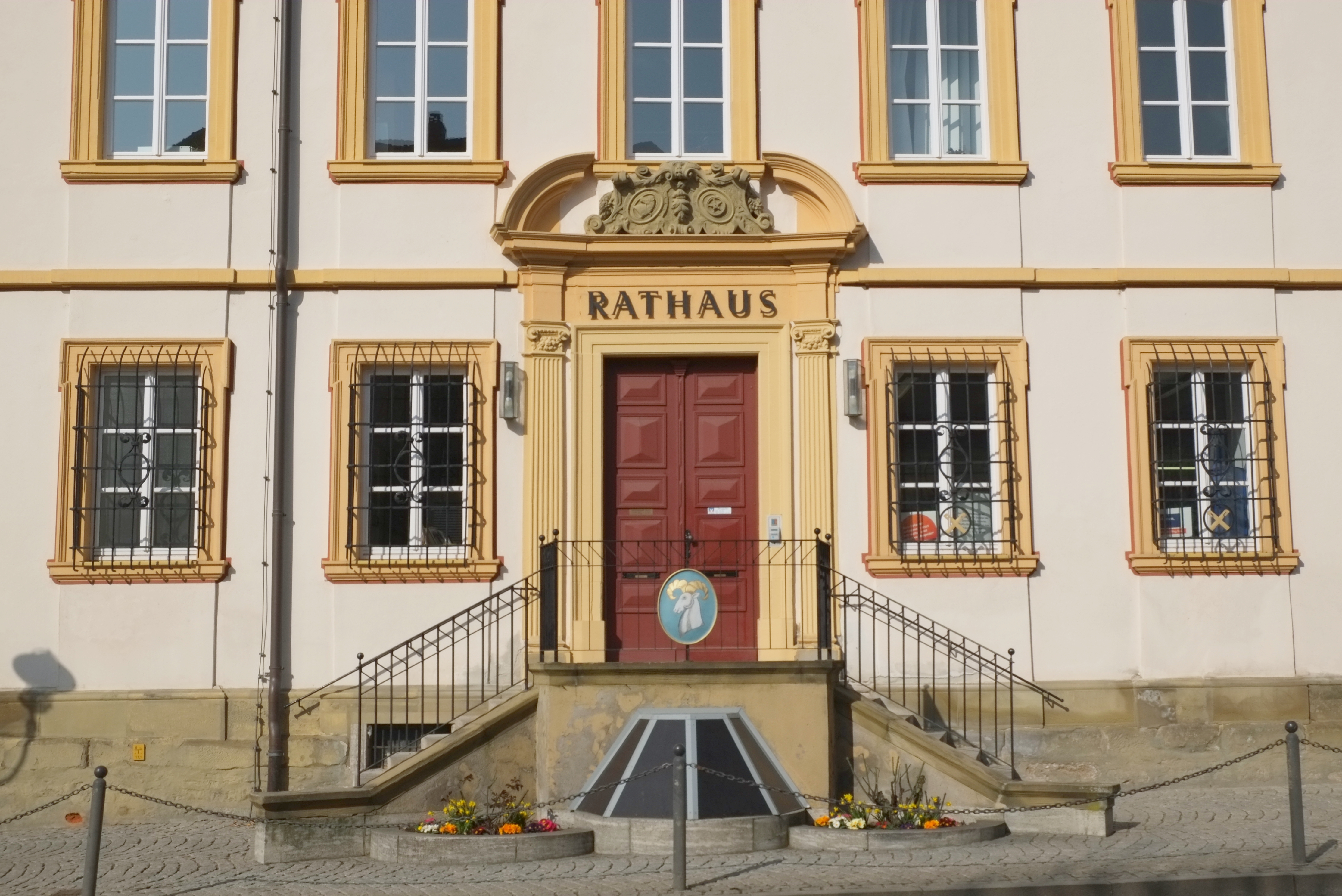 Rathaus in Giebelstadt im Landkreis Würzburg (Bayern, Deutschland)